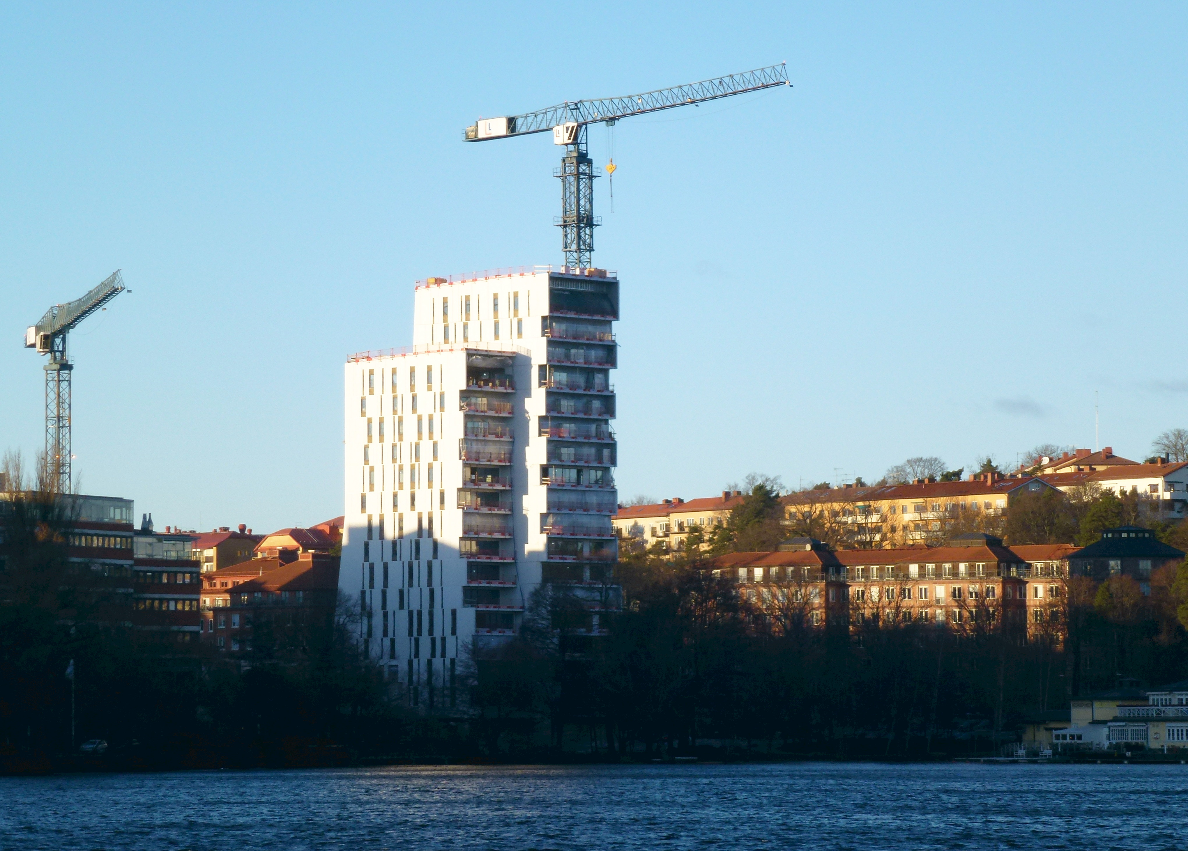 Alviks torn under uppförandet